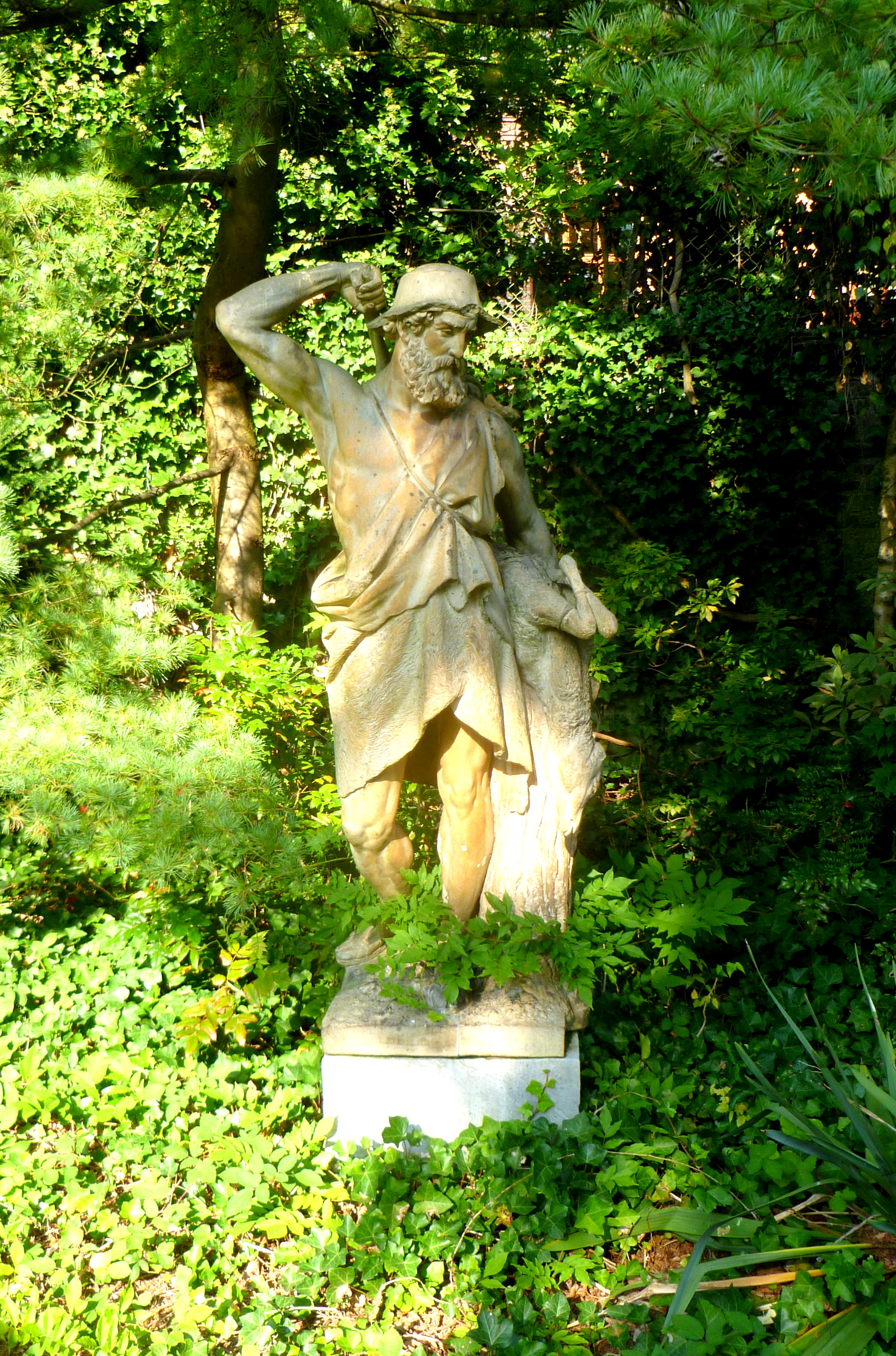 Skulptur im Haus Matthey in Aachen, Theaterstraße